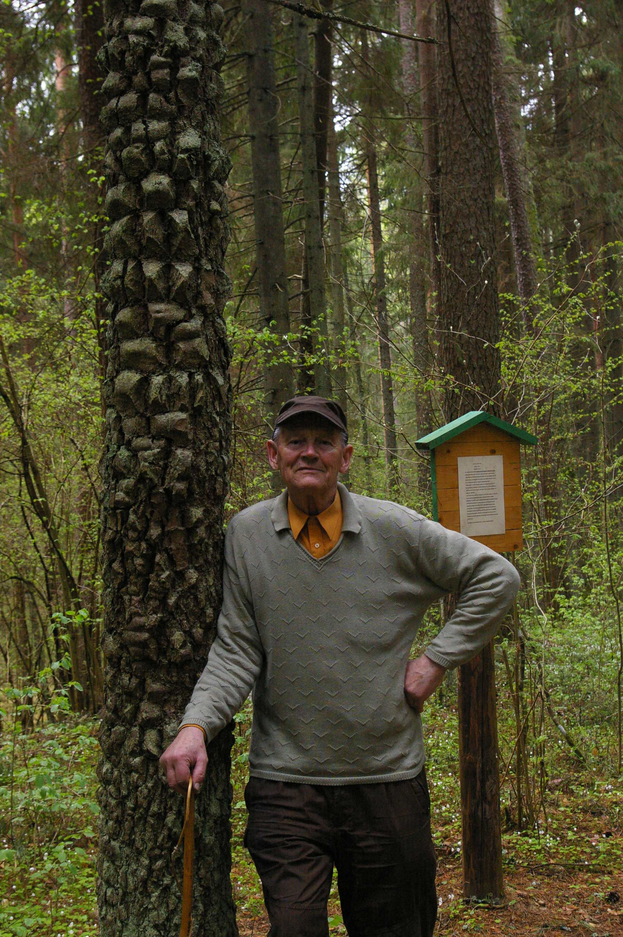 Ain Erik krokodillikuusega